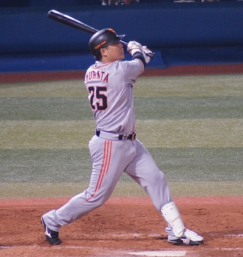 Giants_murata_25